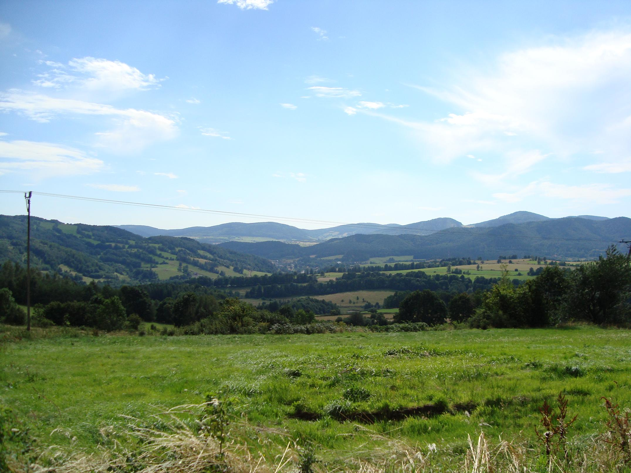 Widok na Góry Sowie z miejscowości Niedźwiedzica